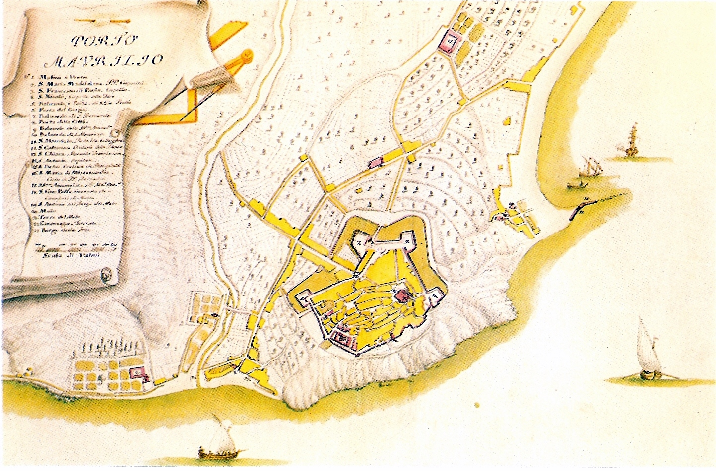 Mappa raffigurante il borgo di Porto Maurizio (Imperia) del cartografo Matteo Vinzoni nel 1773